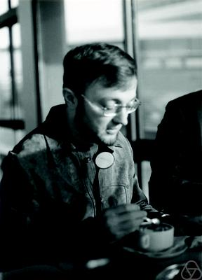 Foto di Anders Martin-Löf